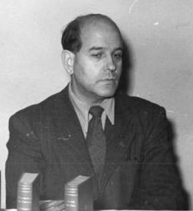 Illus-Rudolph 5.1.51 1. Buchserie fortschrittlicher Schriftsteller erscheint. Die ersten zehn Bände der Bibliothek fortschrittlicher Schriftsteller, die nach der Kulturverordnung der DDR vom 16.3.50 herausgegeben wird, erscheinen jetzt. Aus diesem Anlass fand am 5.1.51 im Kulturbundhaus in Berlin eine Pressekonferenz statt. UBz: Willi Bredel (links) daneben Prof. Wieland Herzfelde. Im Vordergrund die Buchserie in Leder gebunden.